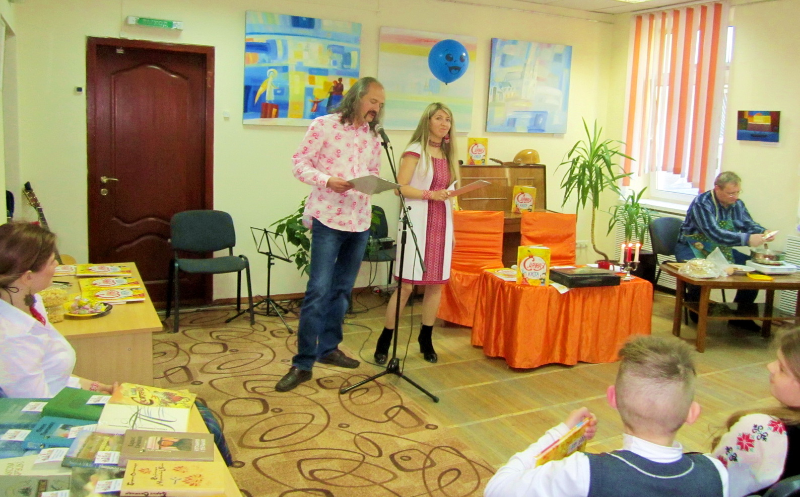 Прэзентацыя кнігі "Смачная кніга"